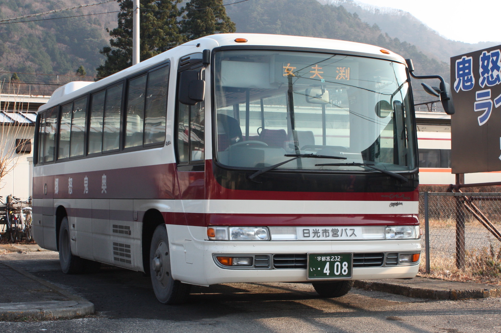 日光市営バス いすゞ・ガーラミオ2代目(RR)